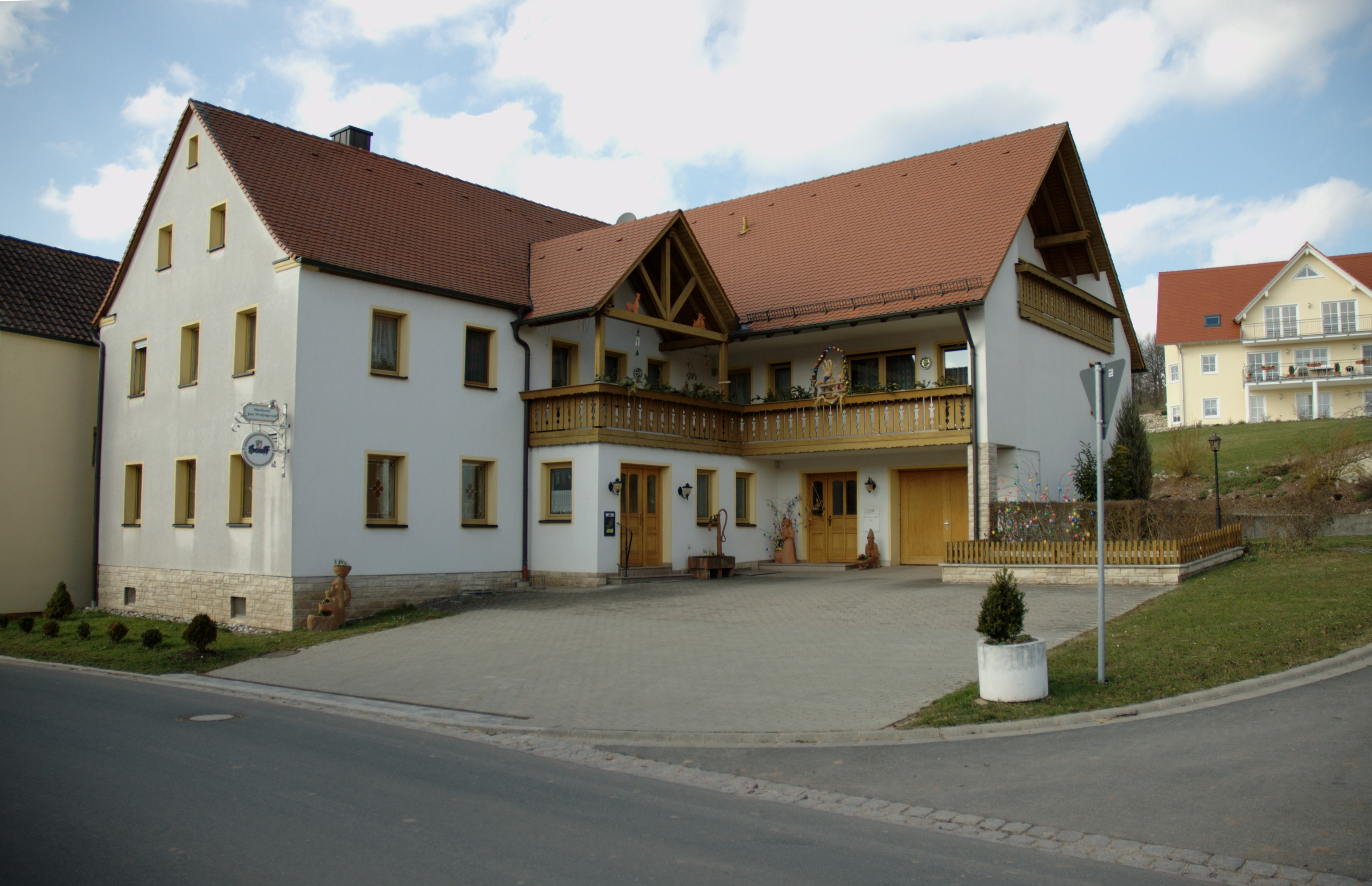 Gaststätte in Untereichenbach